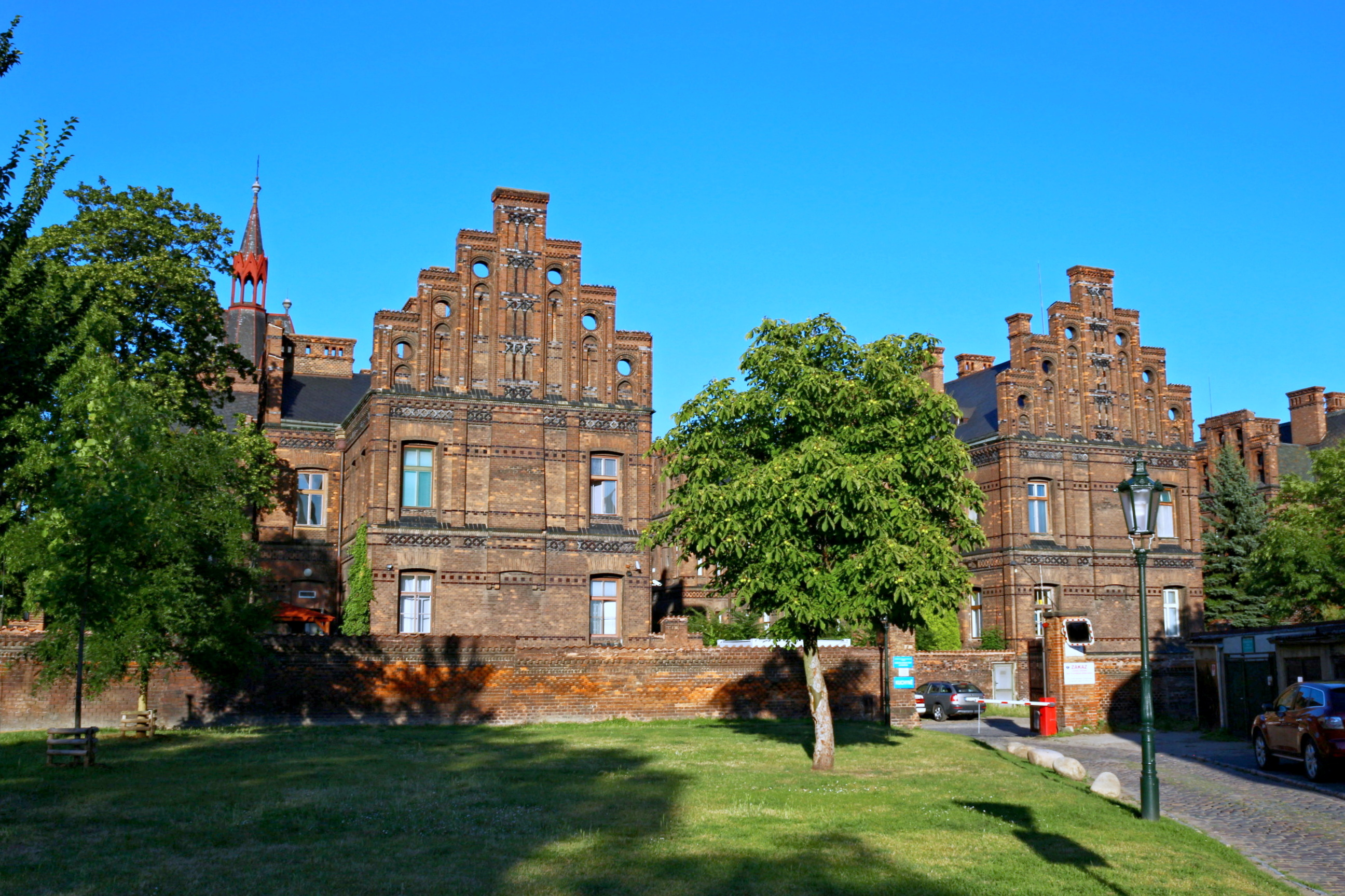 Praha, porodnice u Apolináře